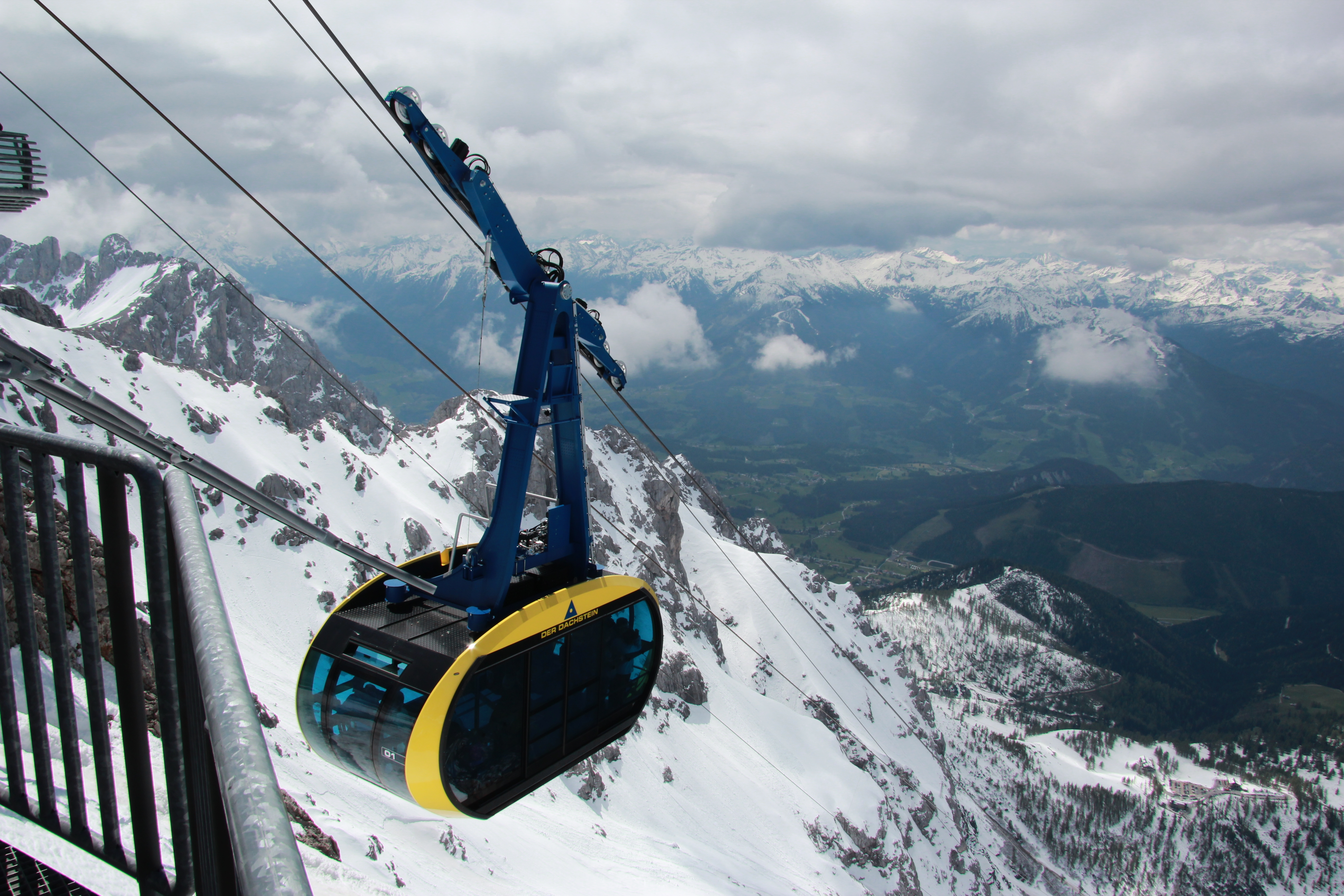 Bilder rund um die Dachsteinsüdwand und Dachsteinseilbahn